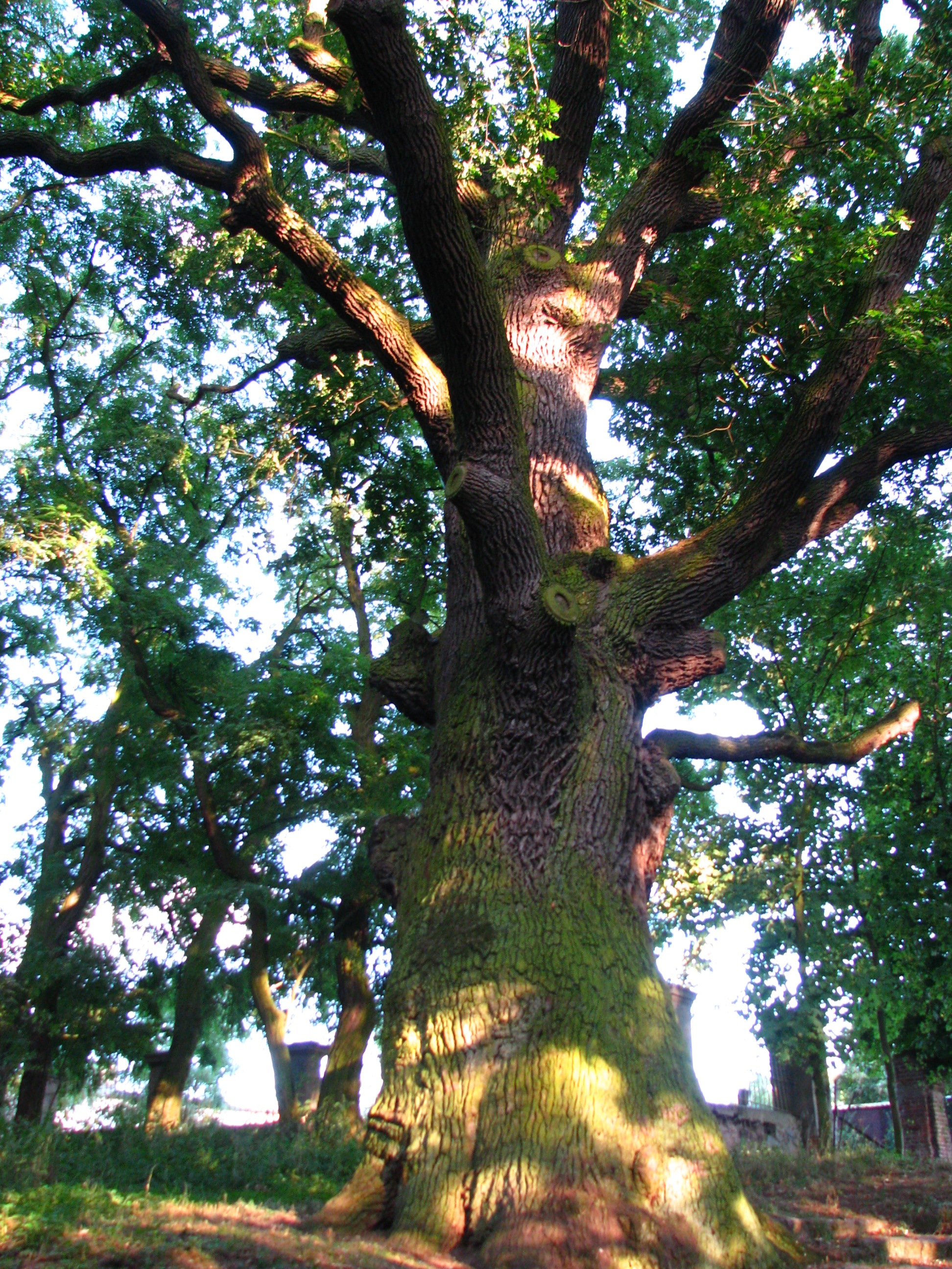 Dąb Sokół, park w Giewartowie, gmina Ostrowite